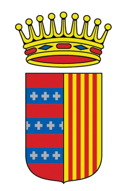 Escut oficial de Malgrat de Mar